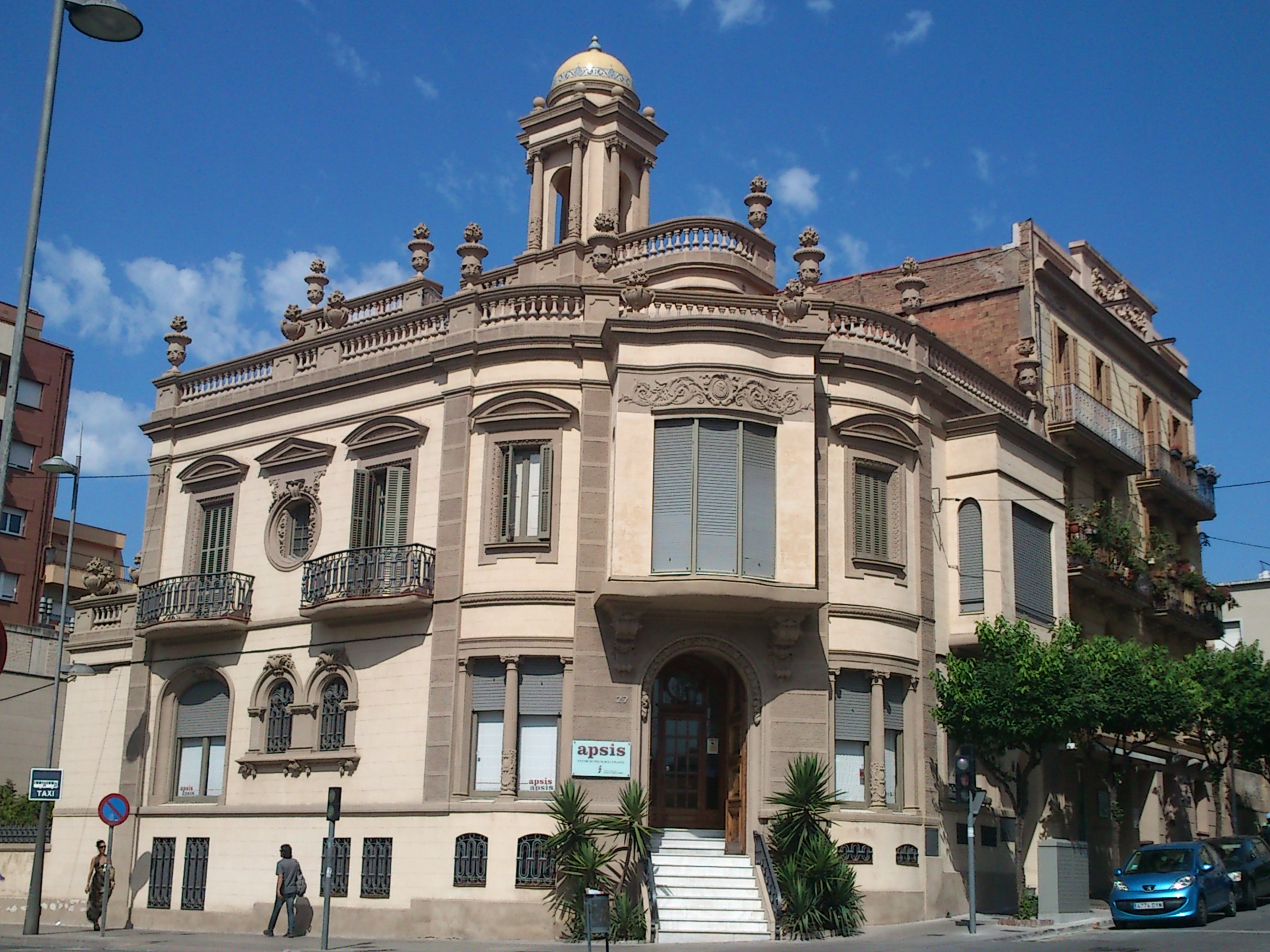 Casa Fèlix Gallent (Dalt de la Vila, Badalona), obra de Joan Amigó i Barriga (no modernista, estil clàssic que beu del noucentisme)